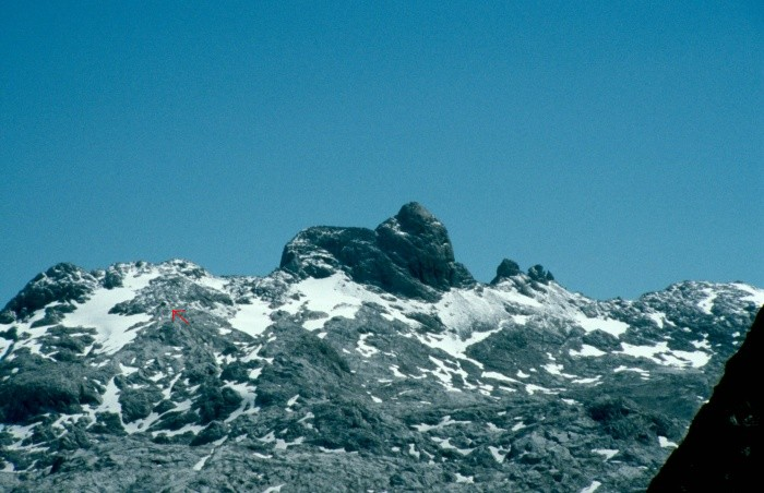 Wildalmkirchl (2573 m), Steinernes Meer. Links unterhalb mit rotem Pfeil markiert ist die Wildalmkirchl-Biwakschachtel.